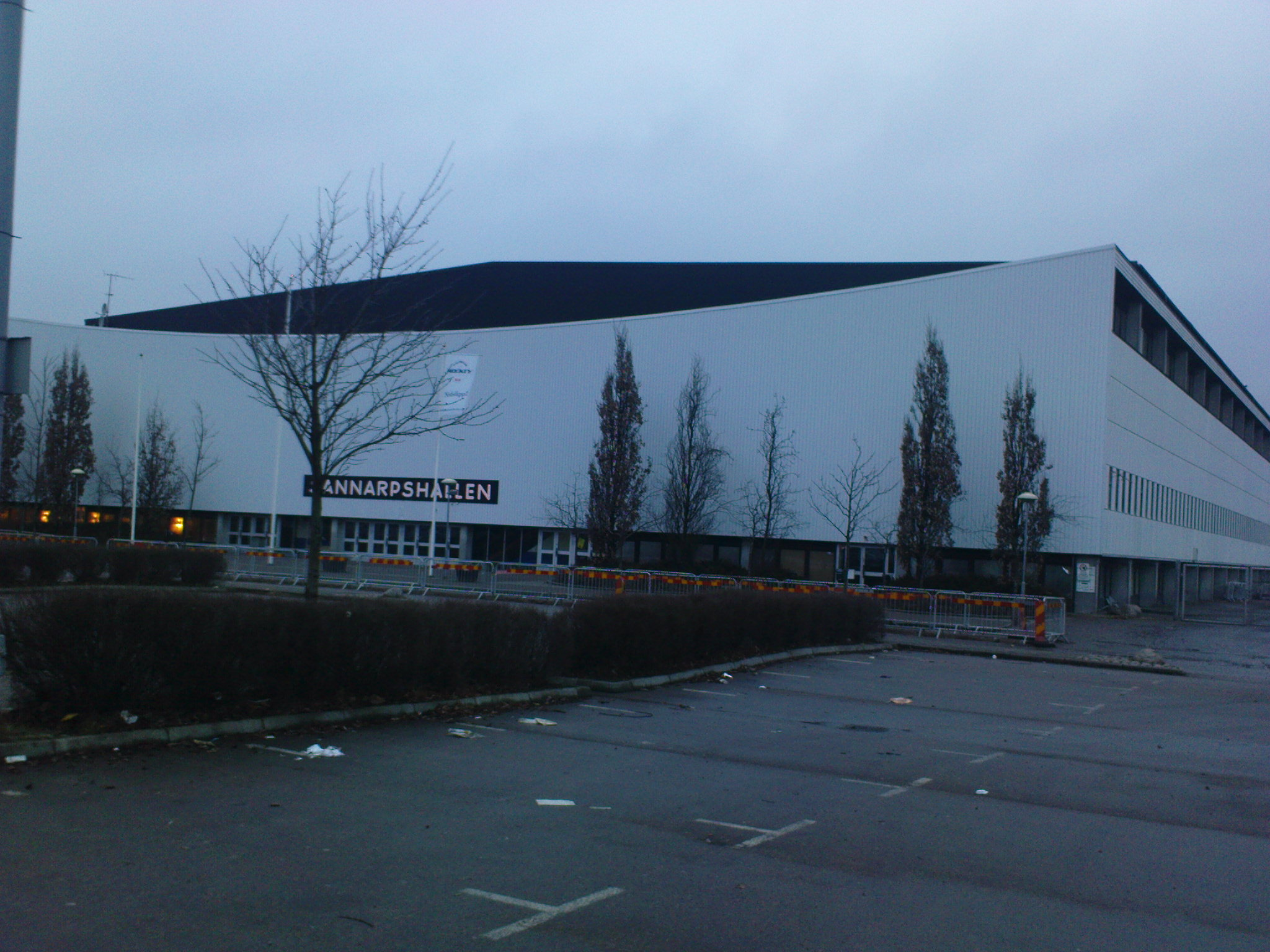 Sannarpshallen juldagen 2007.